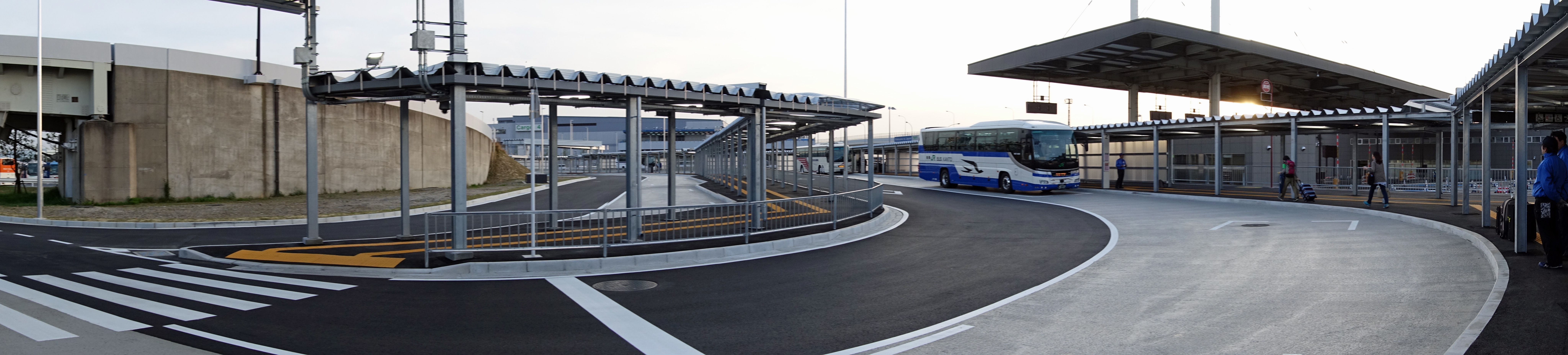 成田国際空港第3ターミナル リムジンバス乗り場